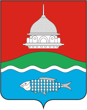 Герб Бугульминского района, Татарстан